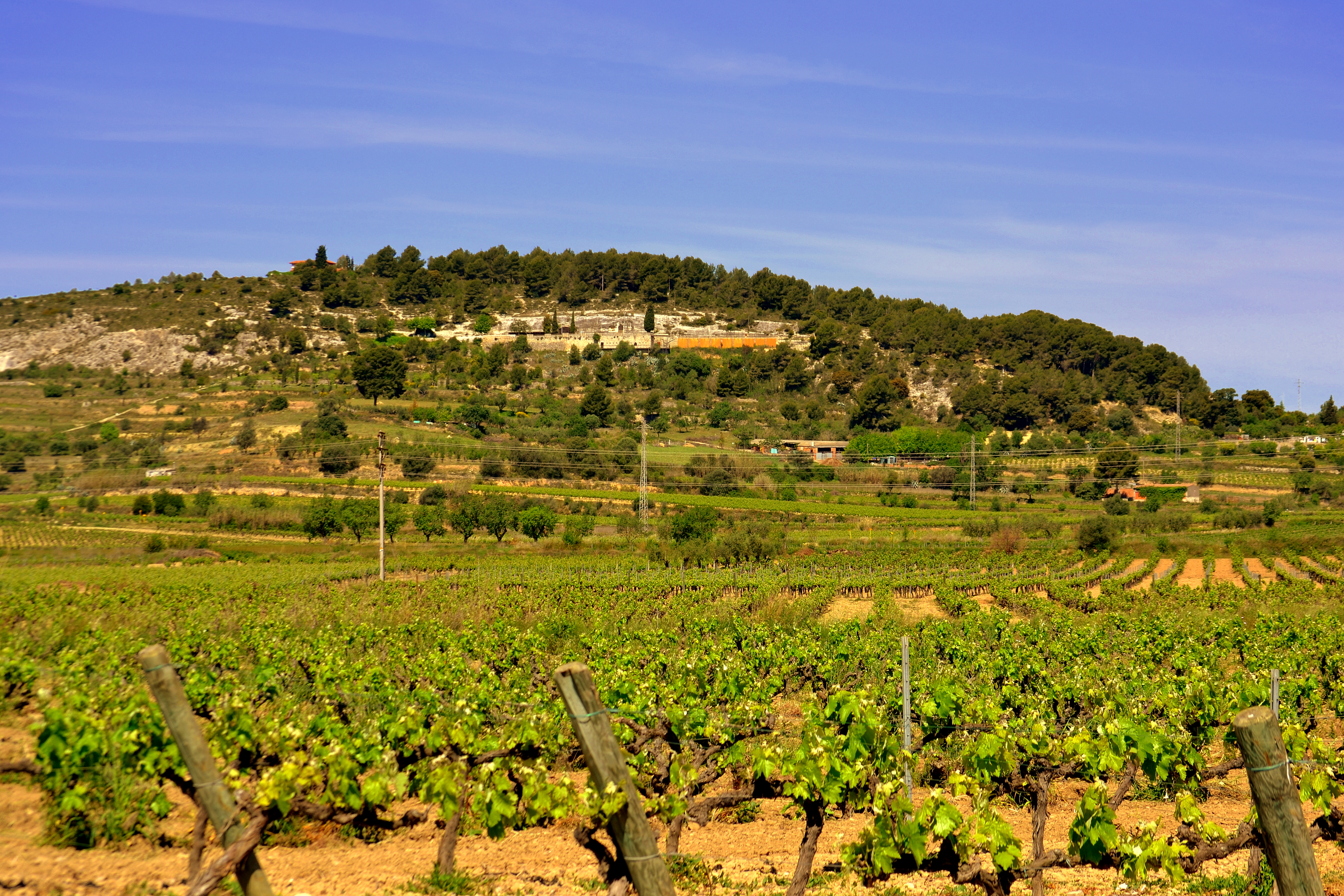 Turons de Pacs del PenedÃ¨s This is a a photo of a geologic site or geotope in Catalonia, Spain, with id: IEIGC-342